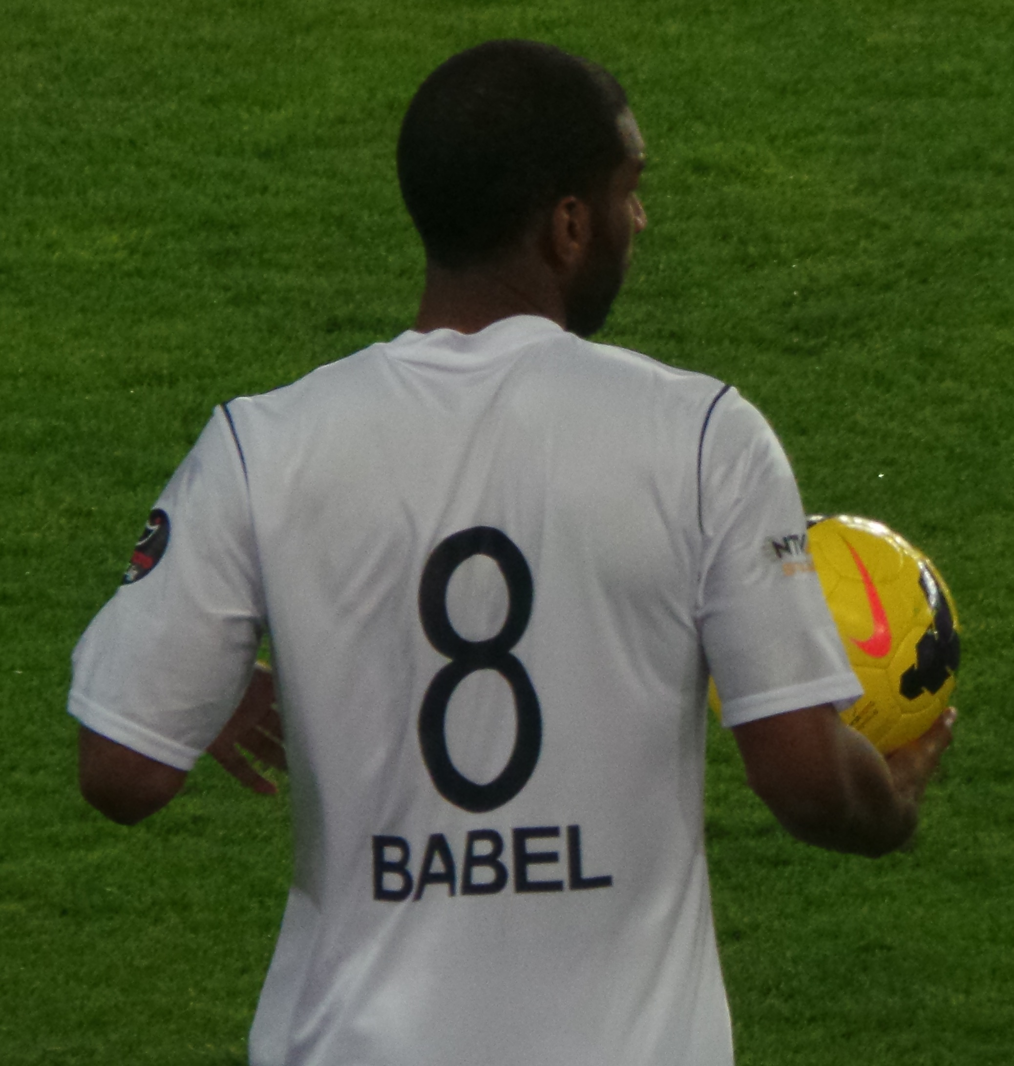 Ryan babel with 8 kit